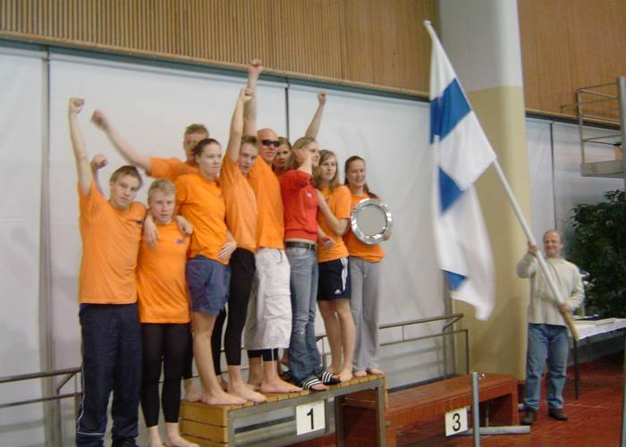 Nuorten lyhyen radan mestaruusuintien 2005 voittajajoukkue Marjaniemen Uimarit järjestäytyneenä potrettiin